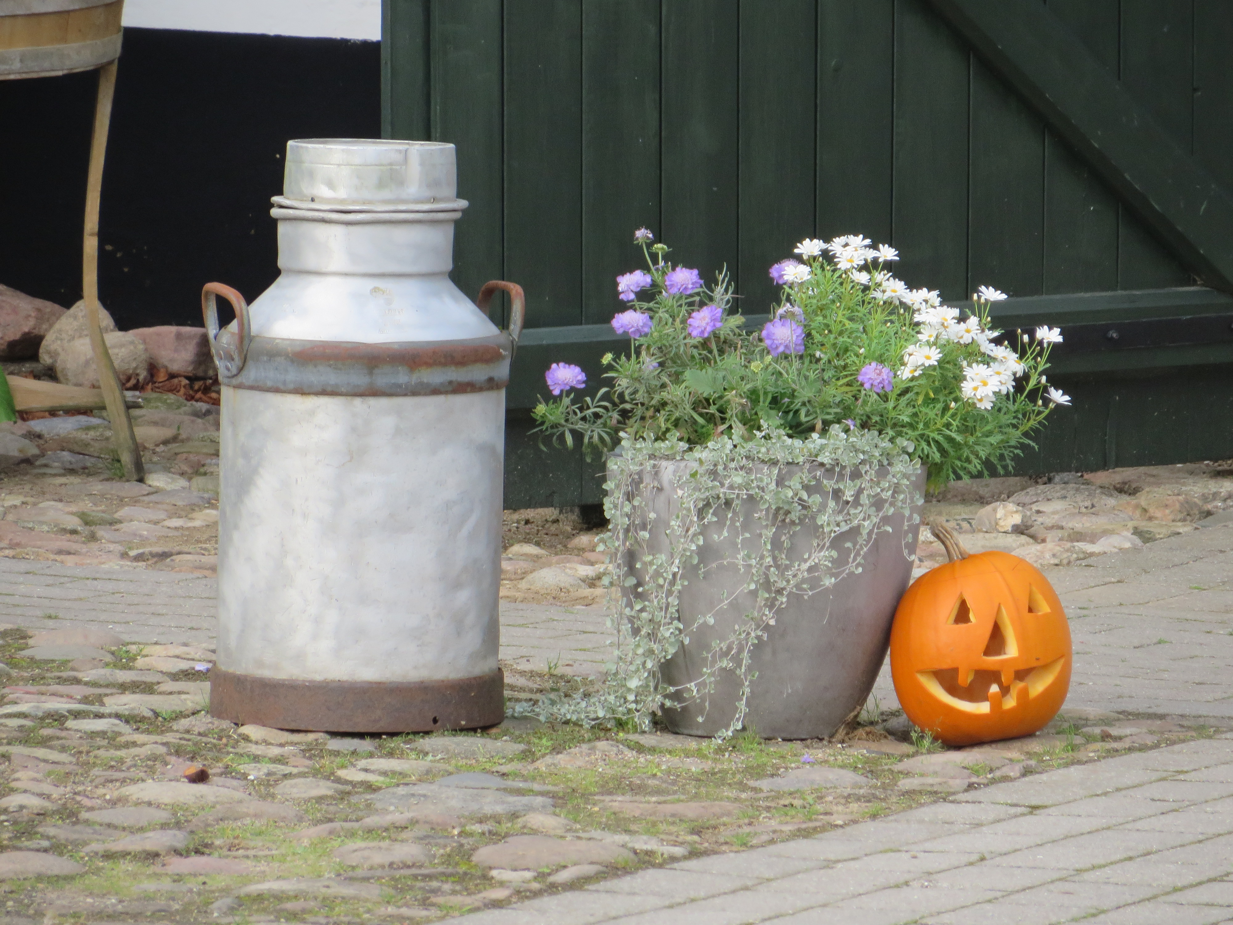 Oldemorstoft, Nebengebäude, Eingangsbereich, Milchkanne, Halloweenkürbis, Bild 002